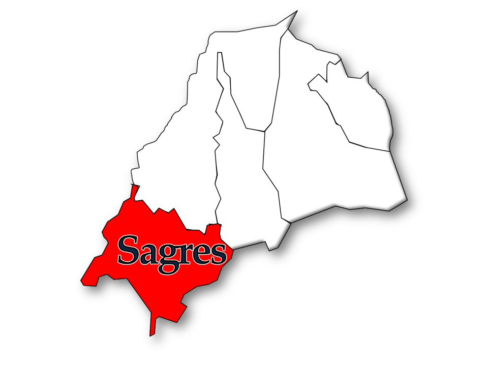 Censos 1864/2011